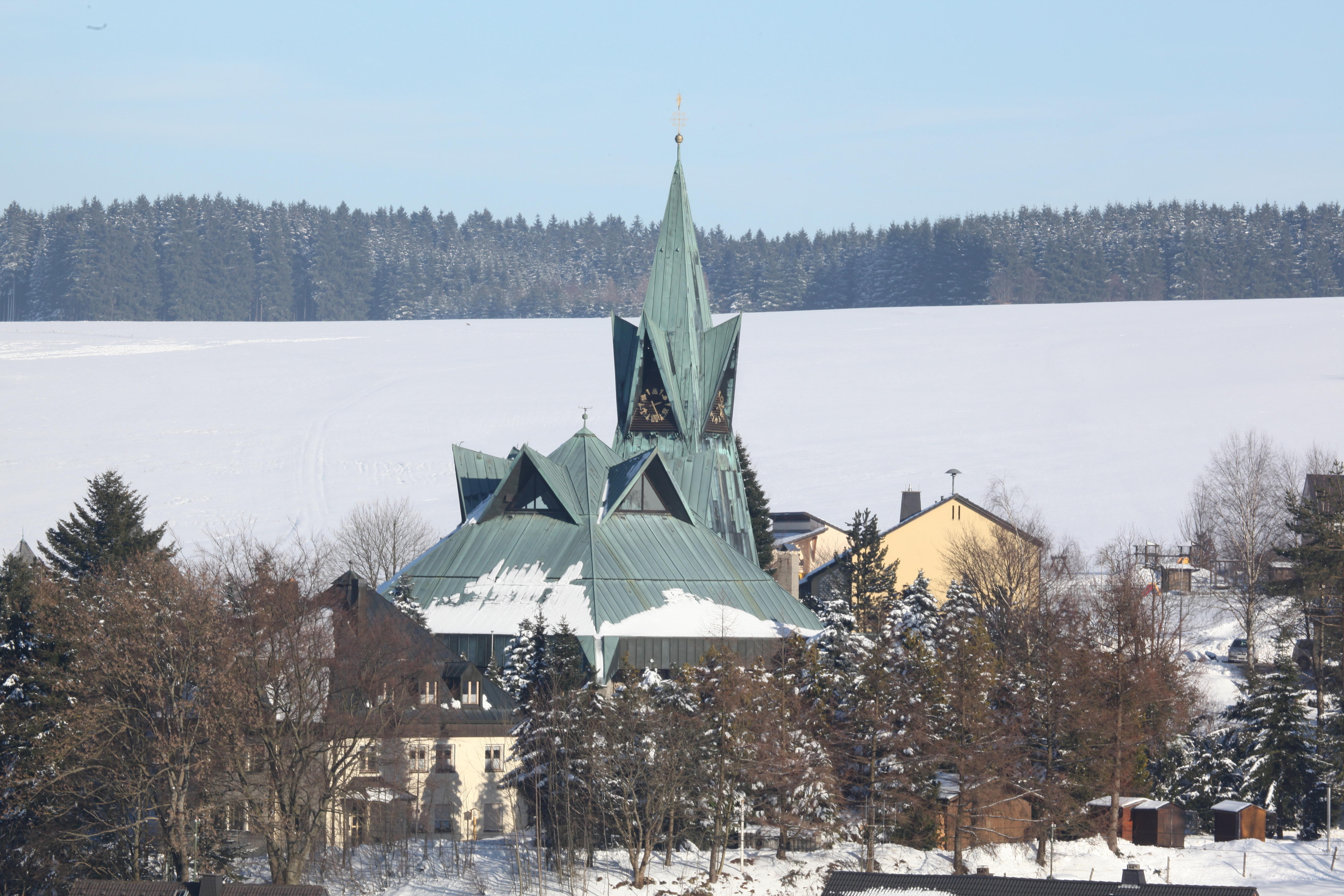 Pfarrkirche St. Laurentius in Buchbach, OT von Steinbach am Wald im Landkreis Kronach